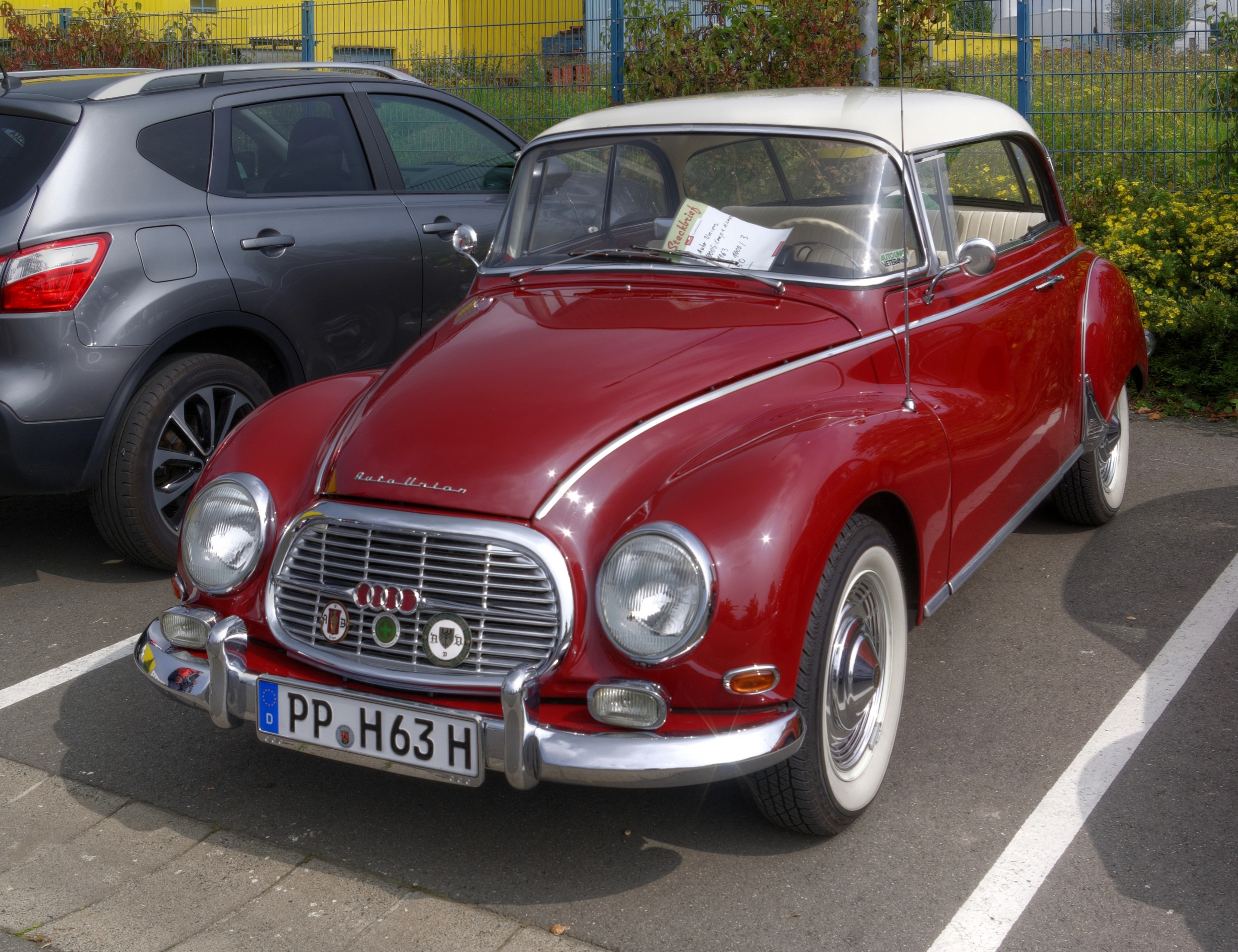 Auto Union 1000S Coupe de Luxe, Baujahr 1963, 1000 cm³, 3 Zyl., 50 PSBitburg Classic 2014 Bitburg Classic 2014 Das Nummernschild ist verfälscht